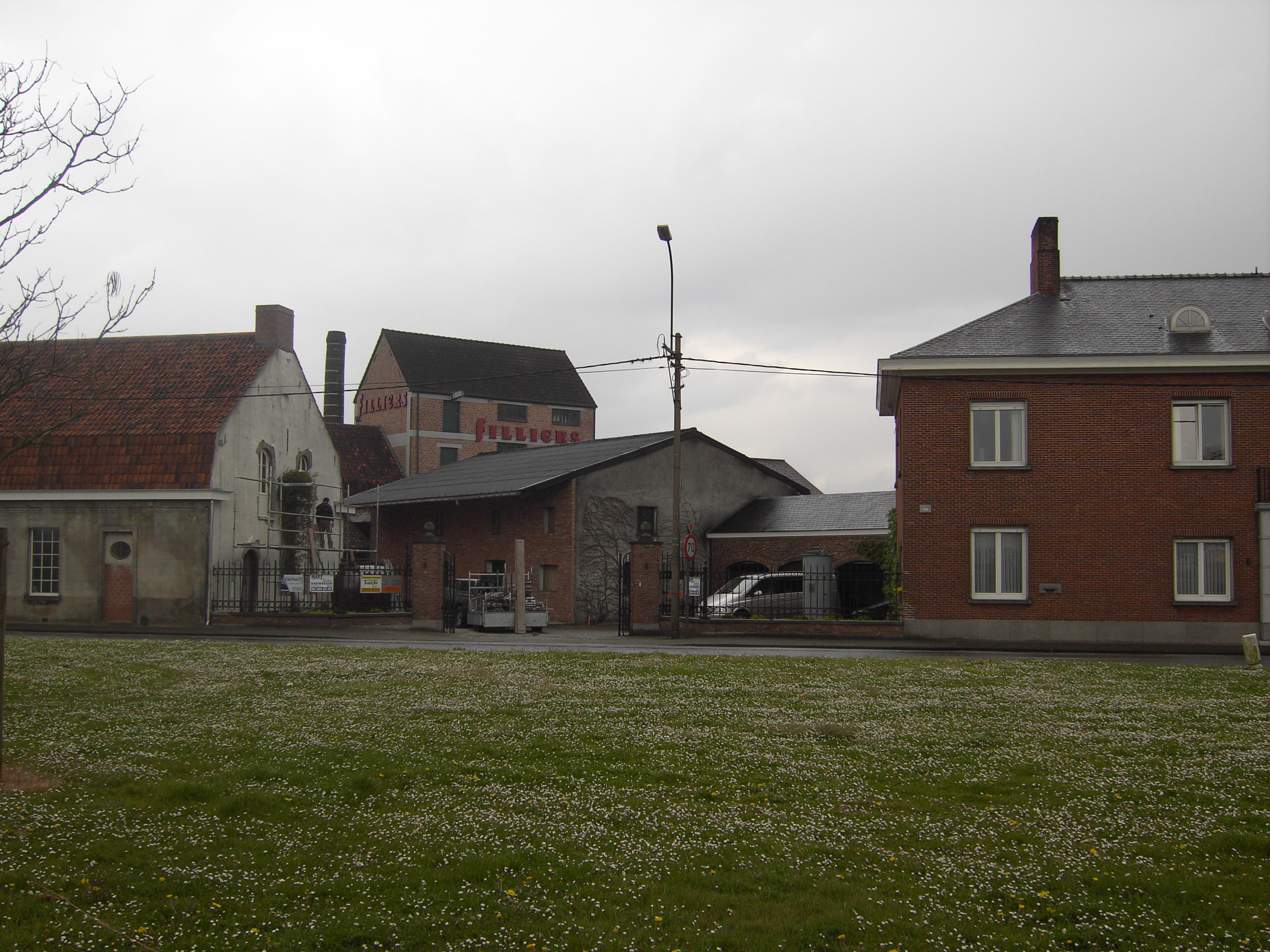 Deinze - Stokerij Filliers - Belgium